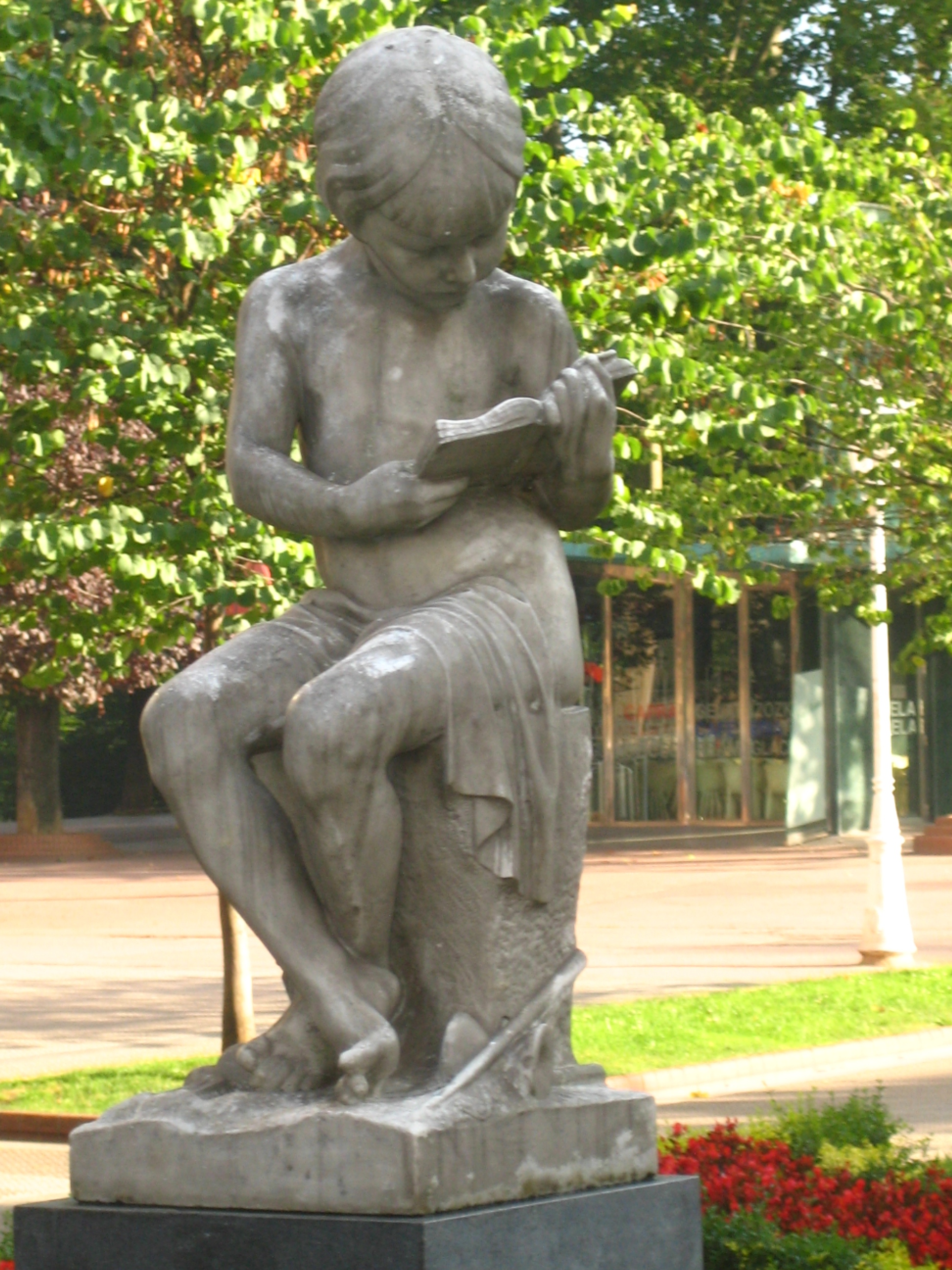 Leyendo, escultura de Joaquín Lucarini, en Bilbao